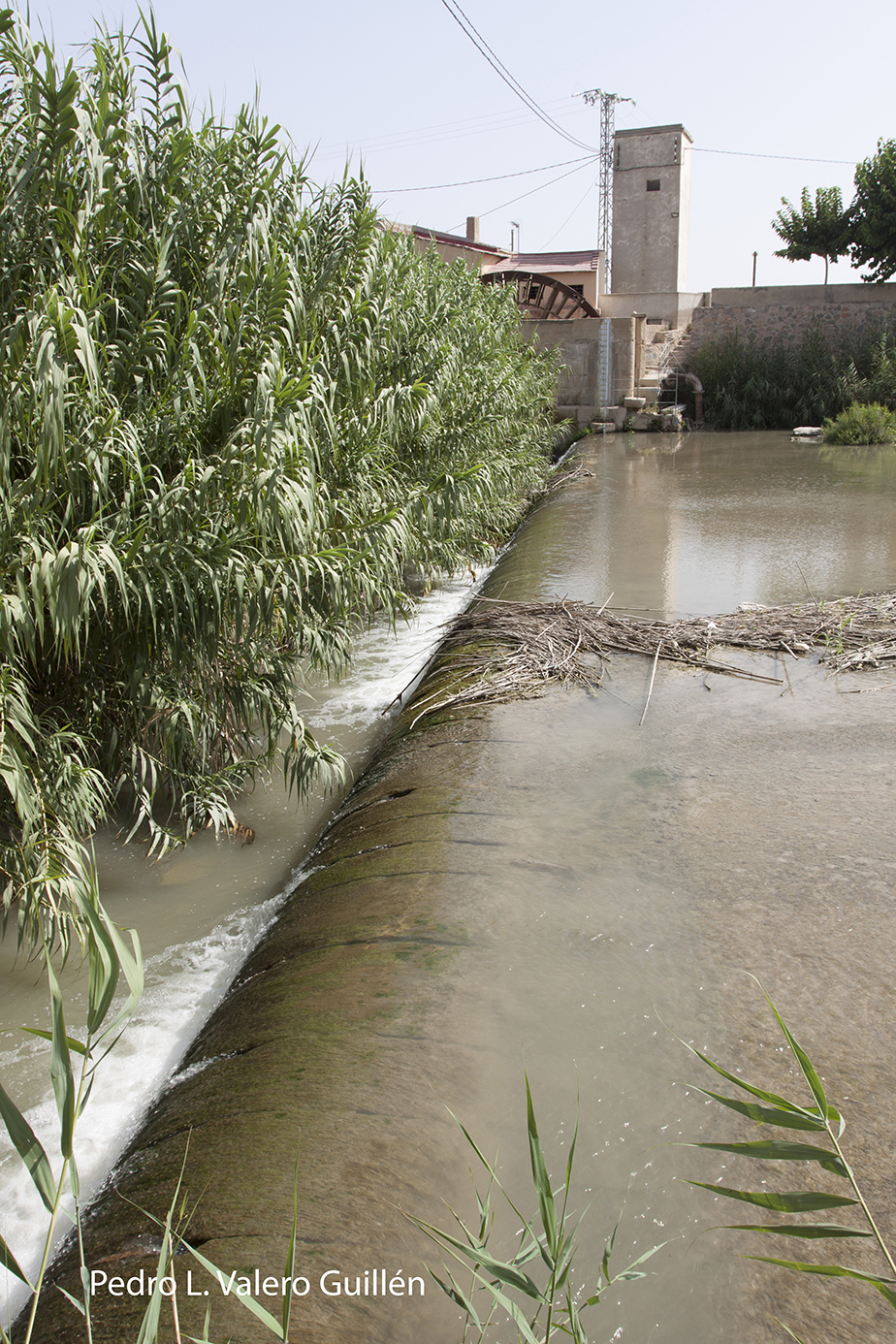 Azud de Las Norias (Desamparados, Orihuela) en el río Segura.